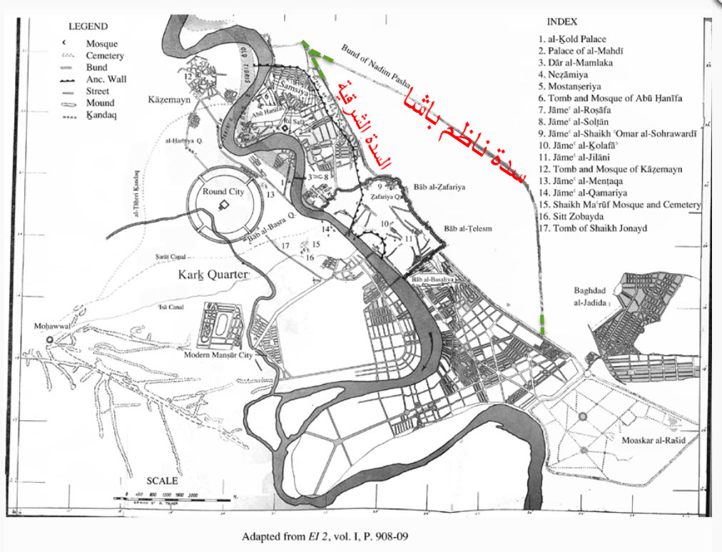 خارطة بغداد القديمة، نُشِرتْ عام 1944، تشتمل على شوارع بغداد الرئيسة، وبعض مداخلها، وتشتمل على رسم سدتي بغداد الشرقيتين، سدة ناظم باشا والسدة الشرقية